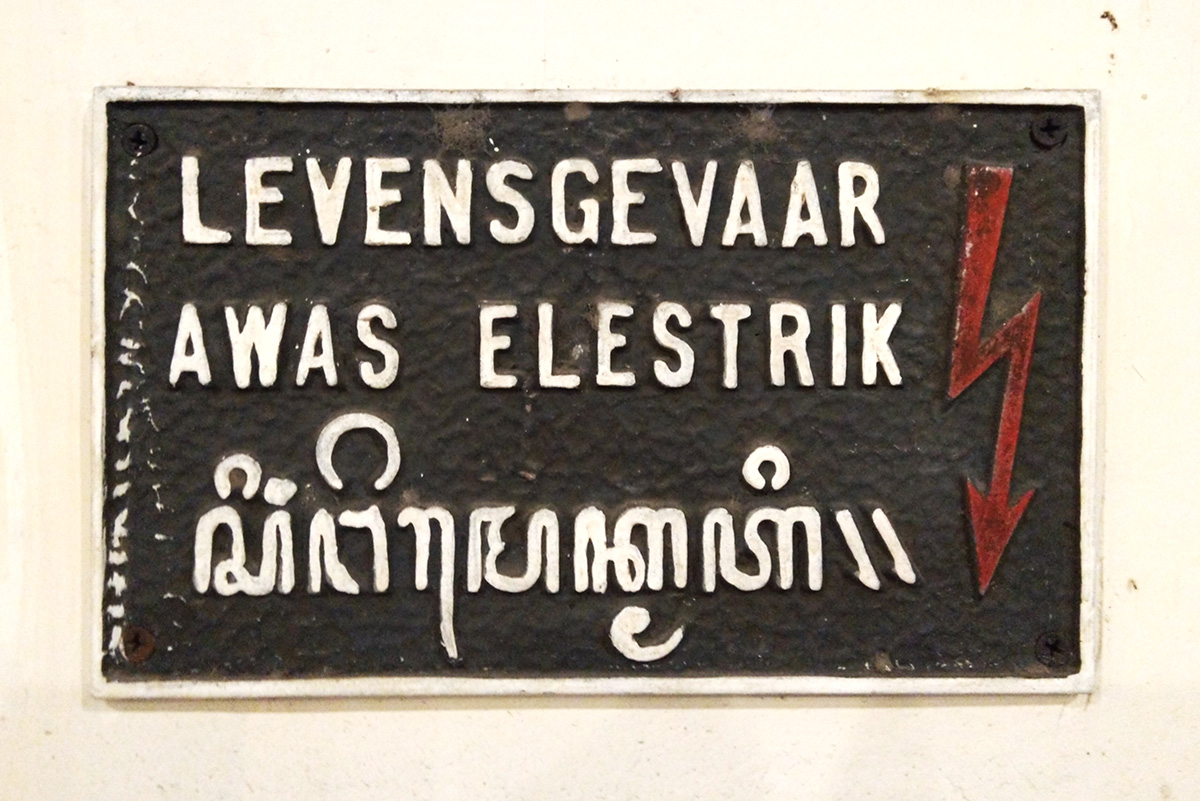 Tanda bahaya listrik dalam bahasa Belanda, Melayu dan Jawa